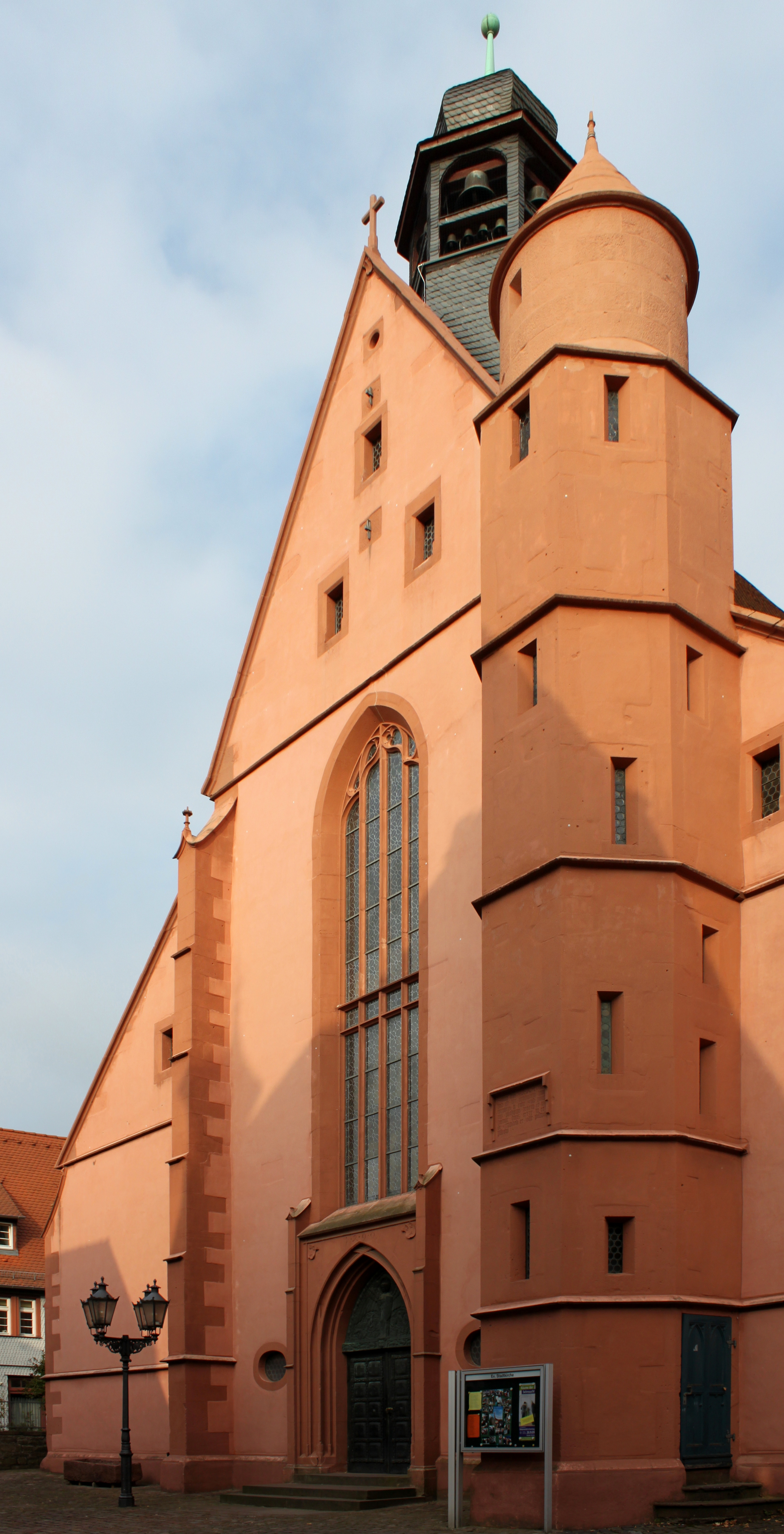 Stadtkirche Michelstadt